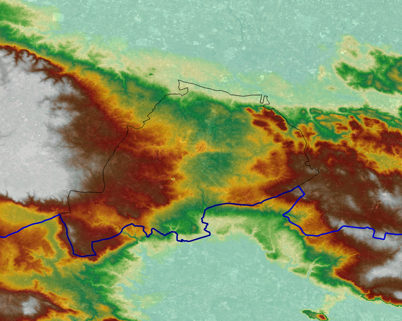 Digital Terrain Model del territorio di Gioia del Colle. In nero i confini comunali, in blu quelli provinciali.